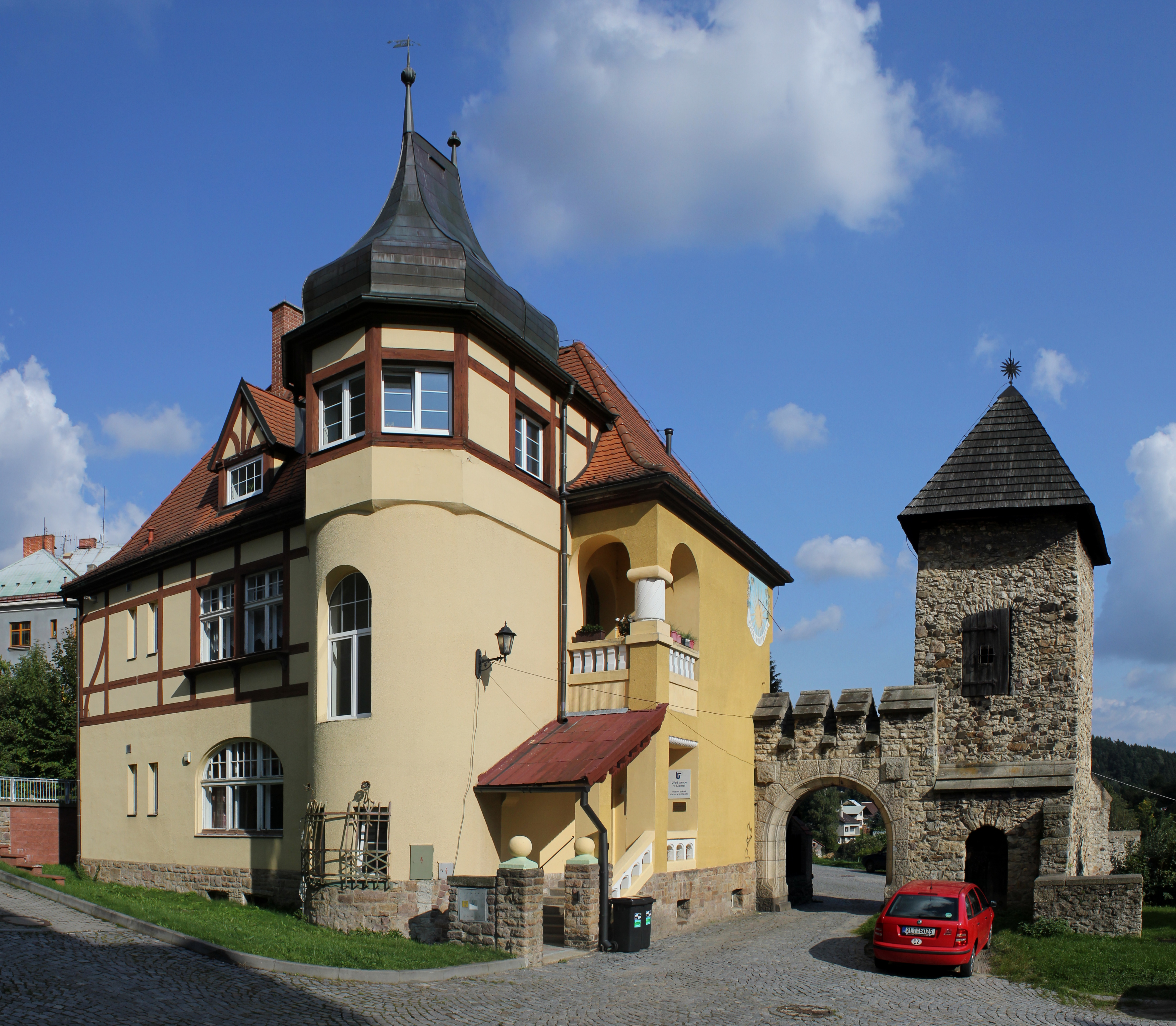 Český Dub I, Komenského čp. 45, dům Helenhof, úřad práce. Vpravo hláska, část středověkého opevnění.